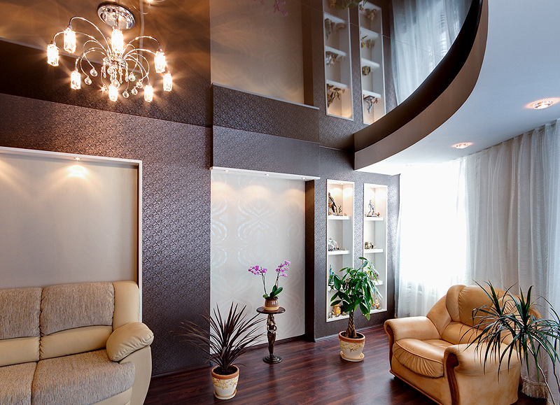 Глянцевый многоуровневый натяжной потолок. Изображение взято отсюда. На исходном изображении по ссылке стоит информация о лицензии (Share Alike 3.0), изображение я обрезал снизу